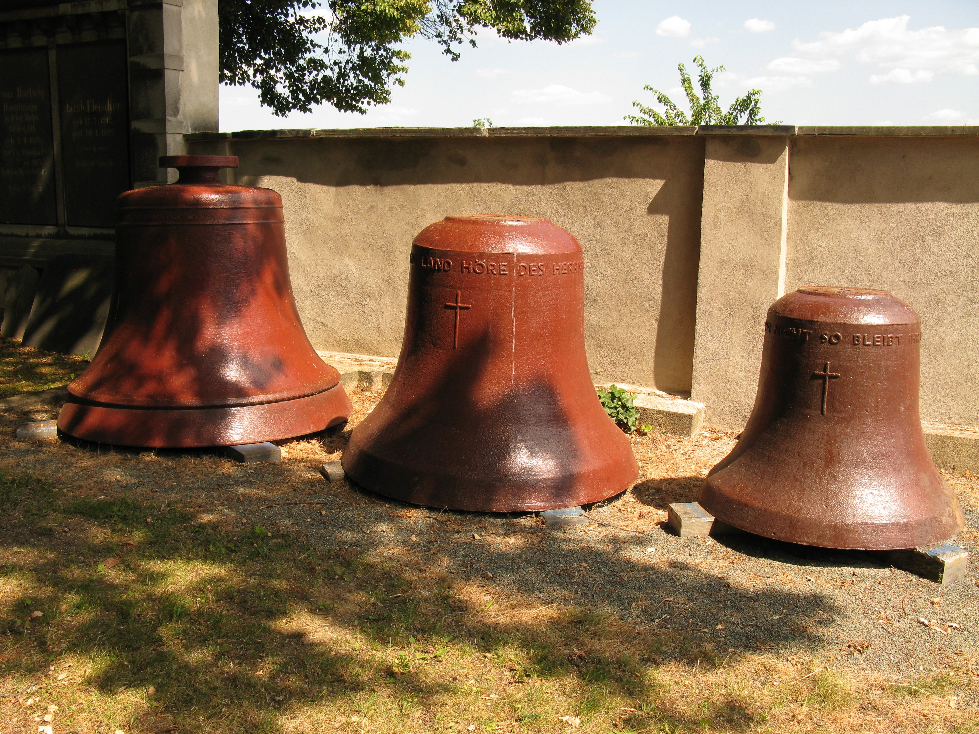 Plauen, Friedhof I - stillgelegtes Geläut der Johanniskirche